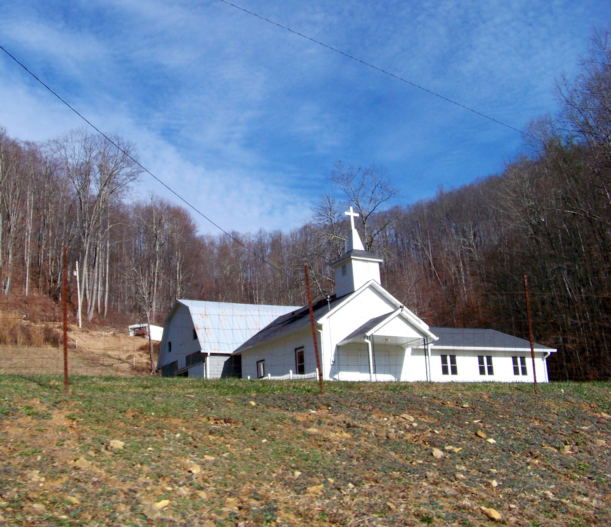 Frank, NC 28657, USA